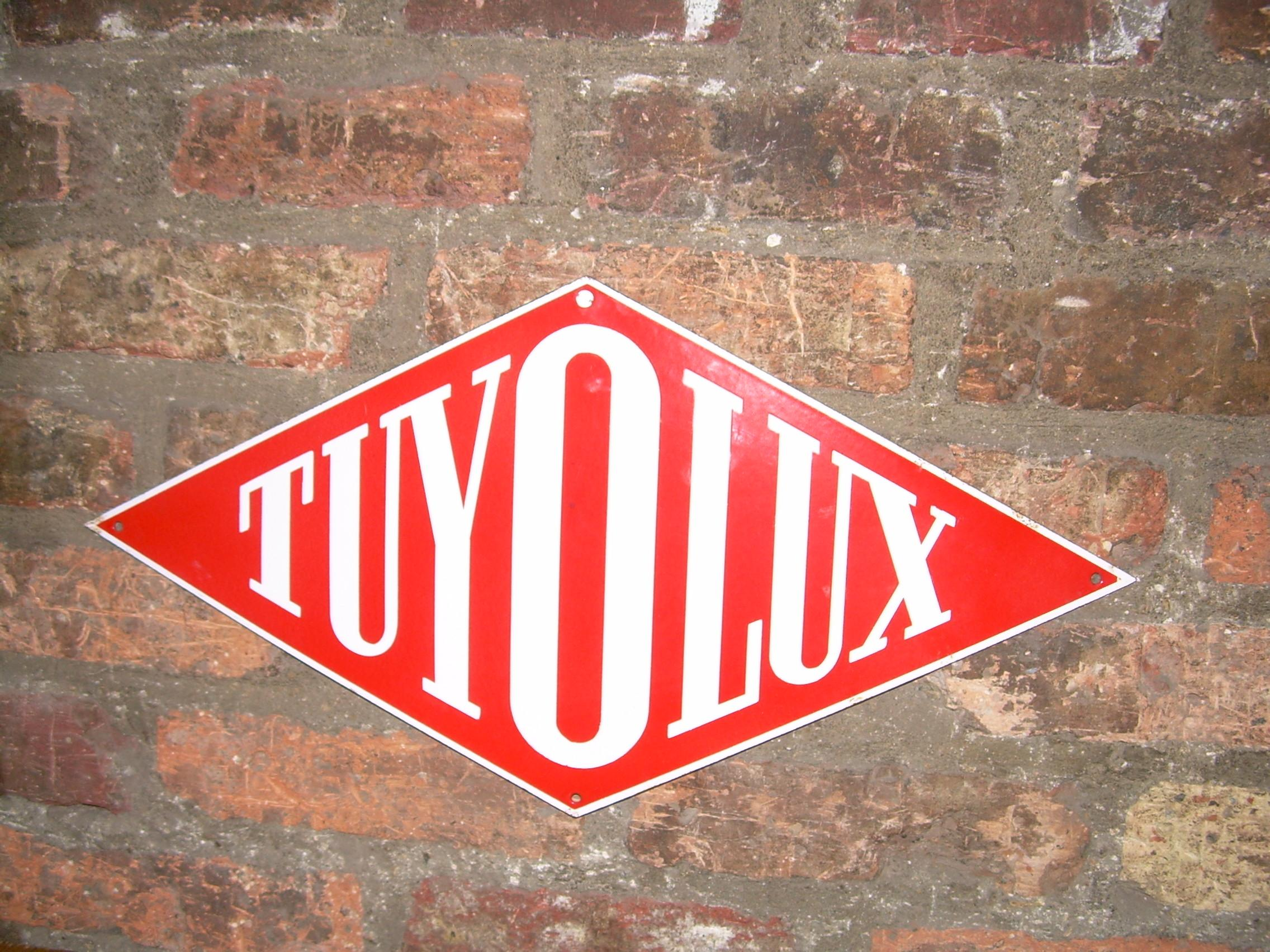 Plaque émaillée marque Tuyolux 1957